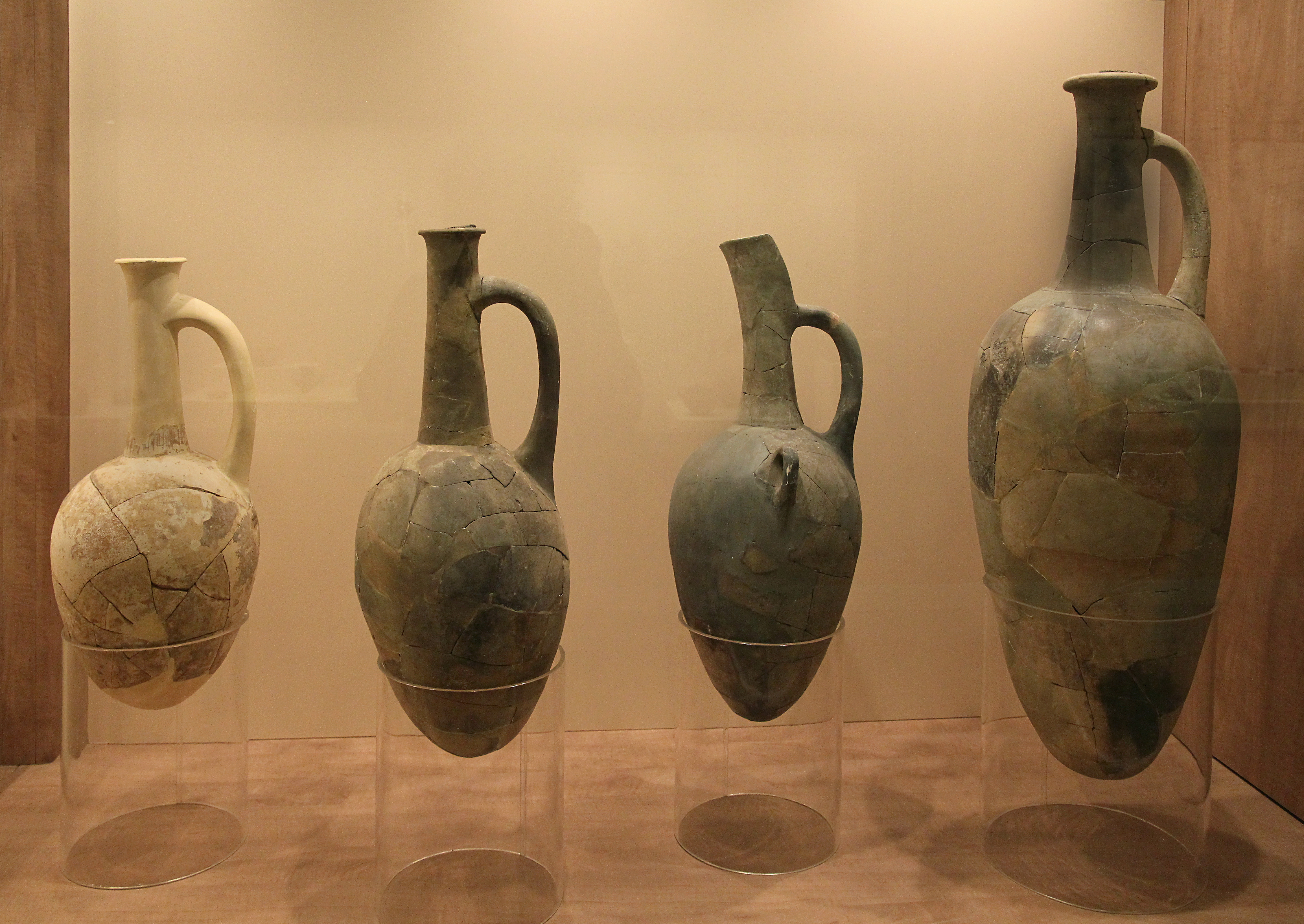 Krüge aus der hethitischen Siedlung von Hüseyindede, Zentraltürkei, im Archäologischen Museum von Çorum